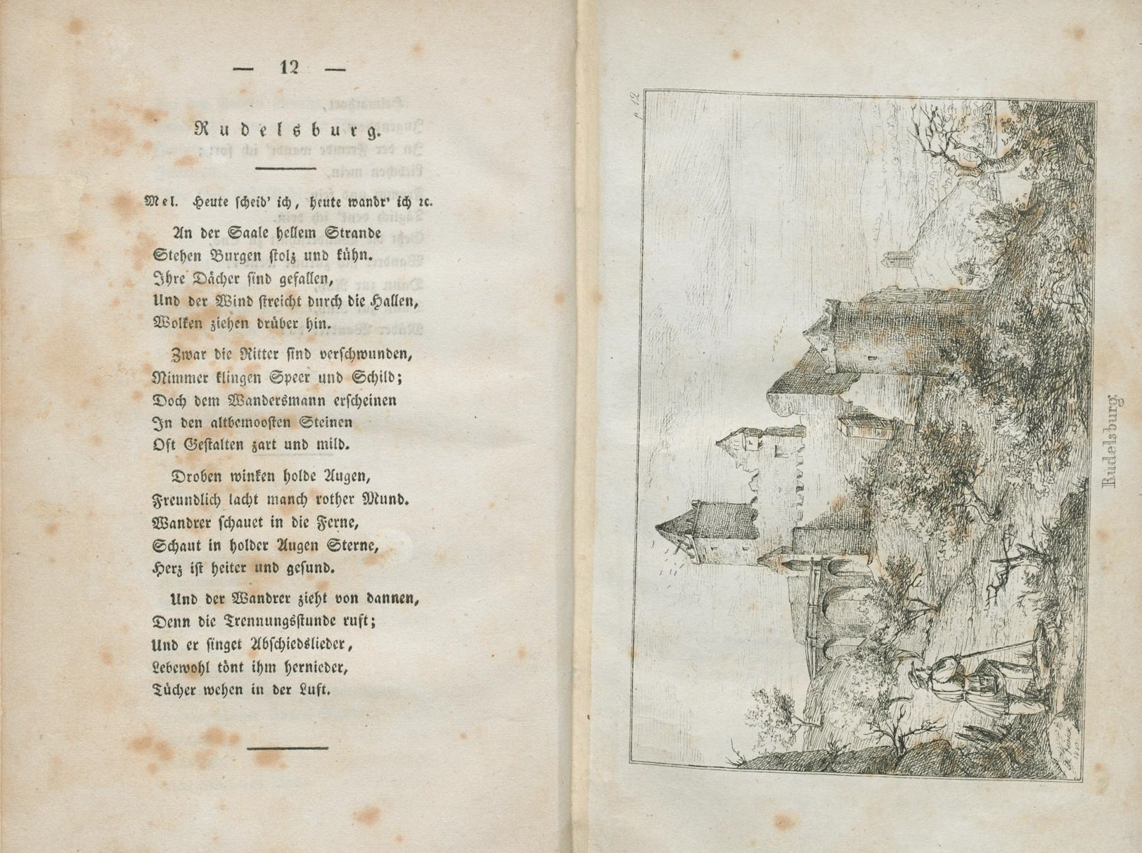 Erstdruck des Liedtextes An der Saale hellem Strande von Franz Kugler mit Abbildung der Rudelsburg